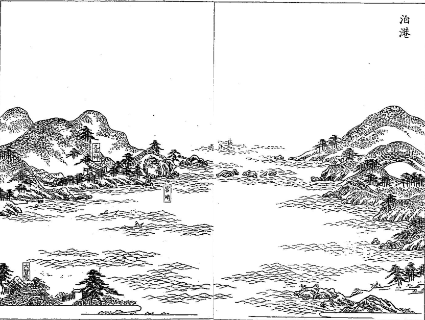 三国名勝図会第26巻掲載の泊港。